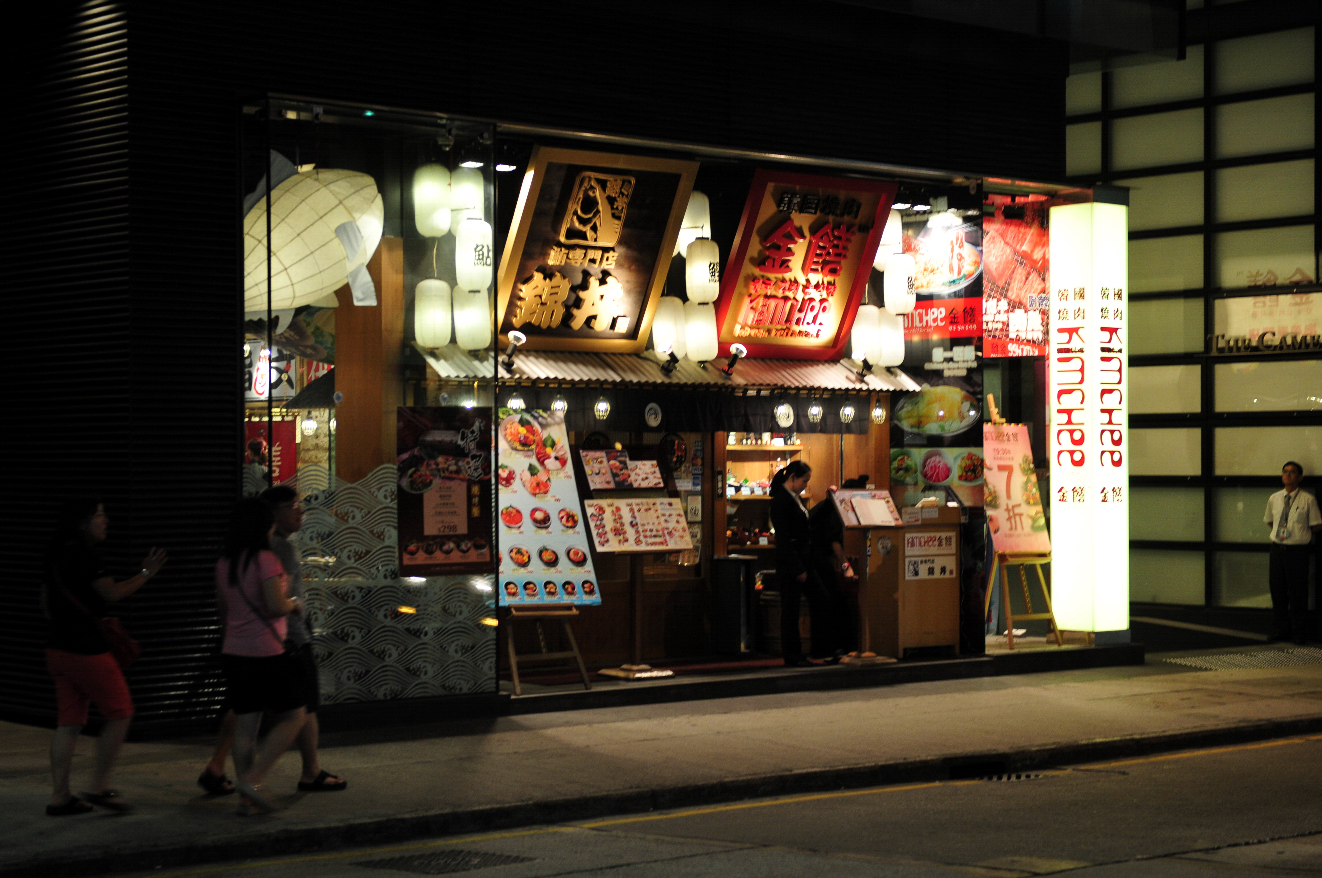 Wikimania 2013 Hongkong